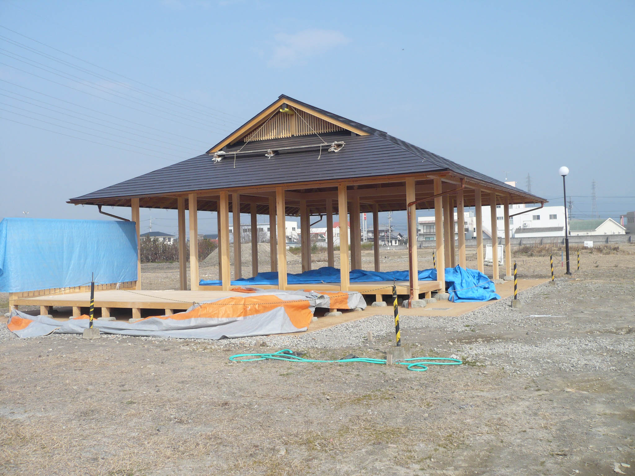 復元会所